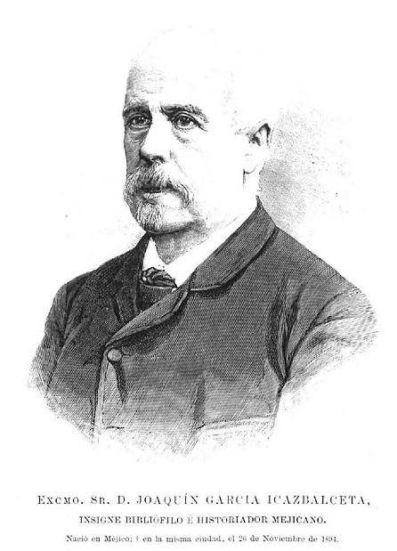 Retrato de Joaquín García Icazbalceta, publicado en la revista española La Ilustración Española y Americana.